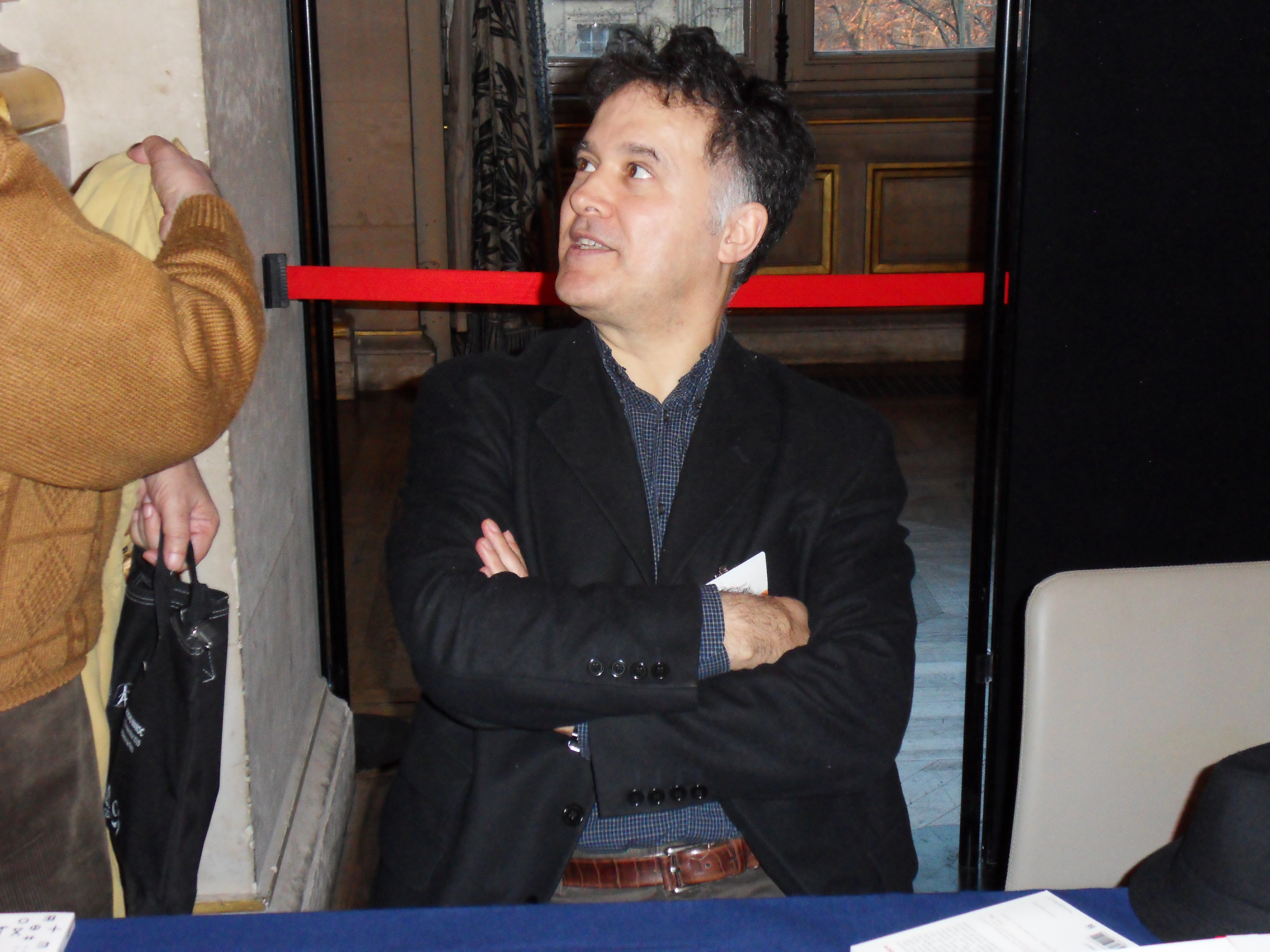 Maghreb des Livres, 11 février 2012 Fouad Laroui, Maghreb des Livres 2012